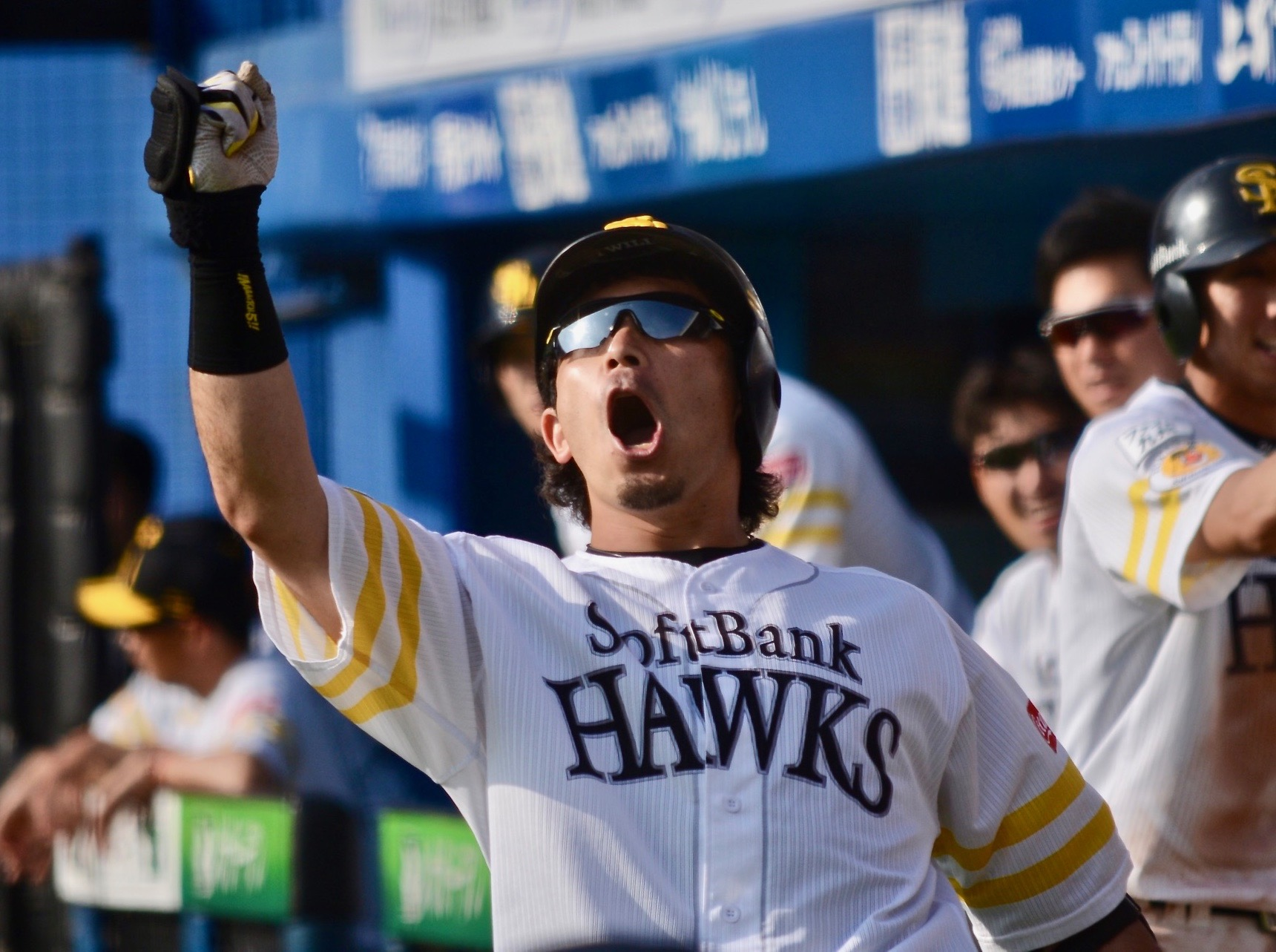 ソフトバンクホークス 松田宣浩 ２０１６年５月２９日 千葉マリンスタジアム